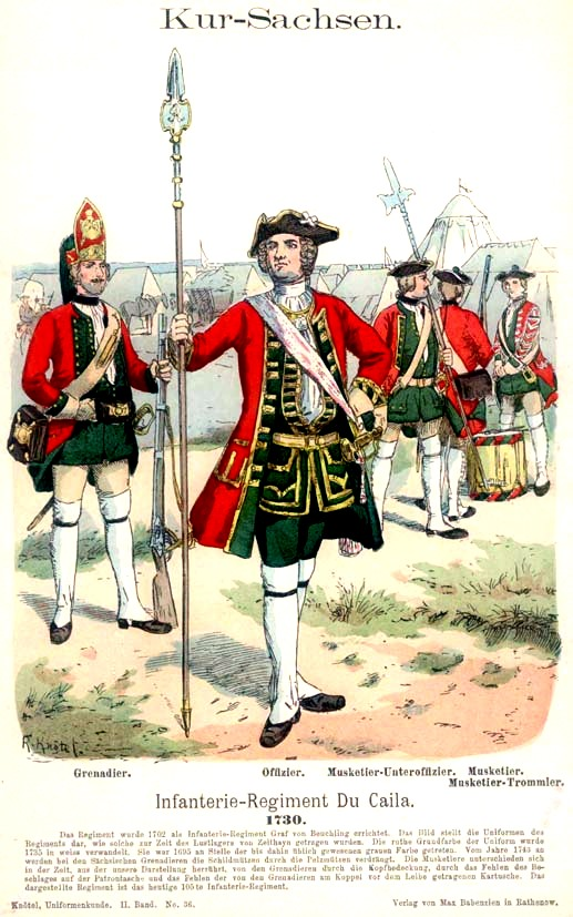 Sächsische Armee: Artillerie, Pioniere und Train